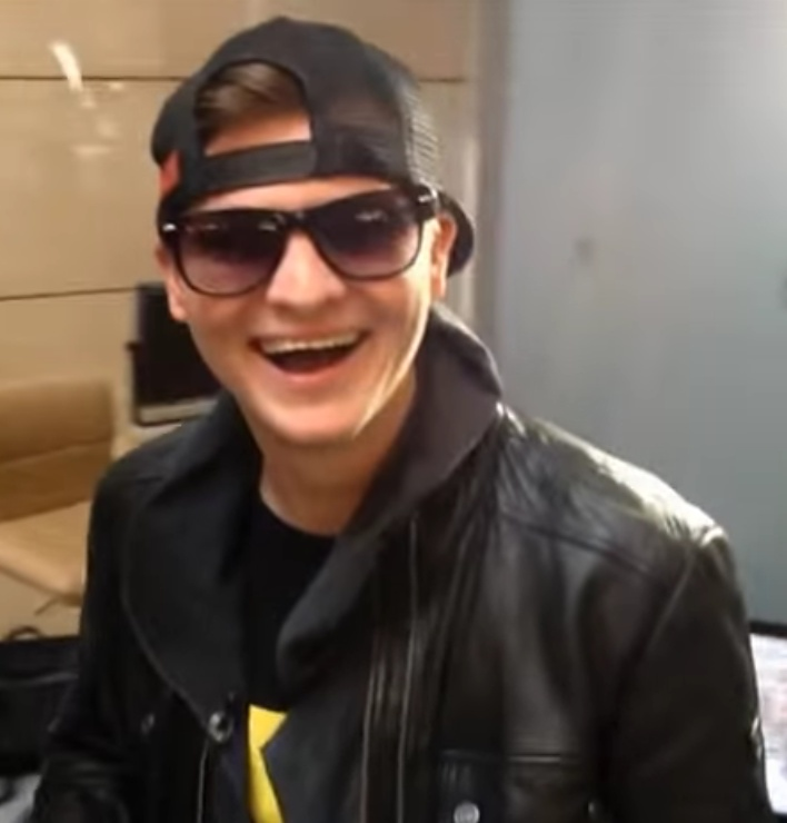 Internetový bavič Kamil Bartošek, známý jako Kazma Kazmitch. Moderátor One Man Show na Stream.cz.